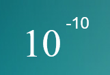 یک آنگستروم